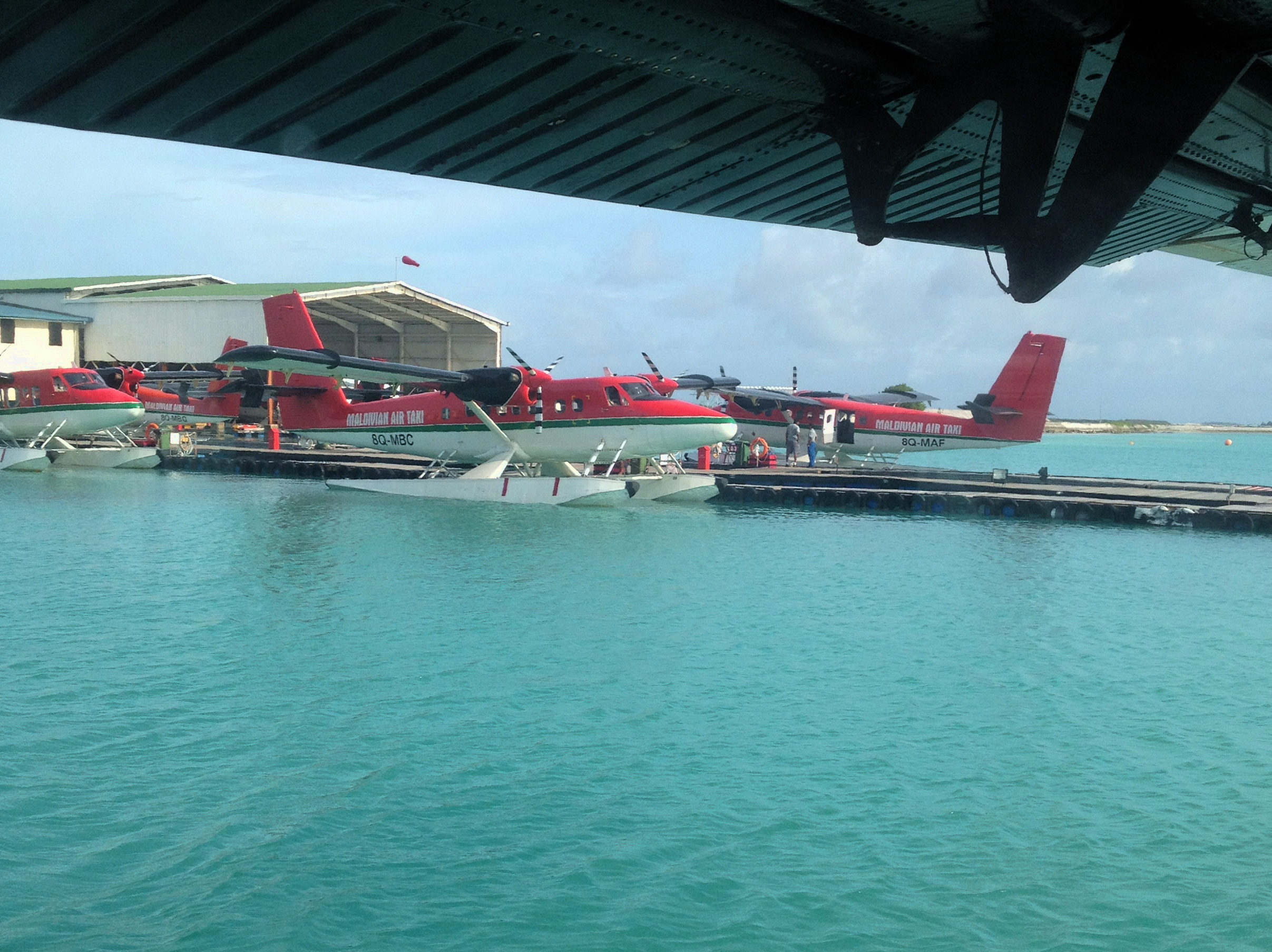 Air Taxi Terminal 水上飛機場